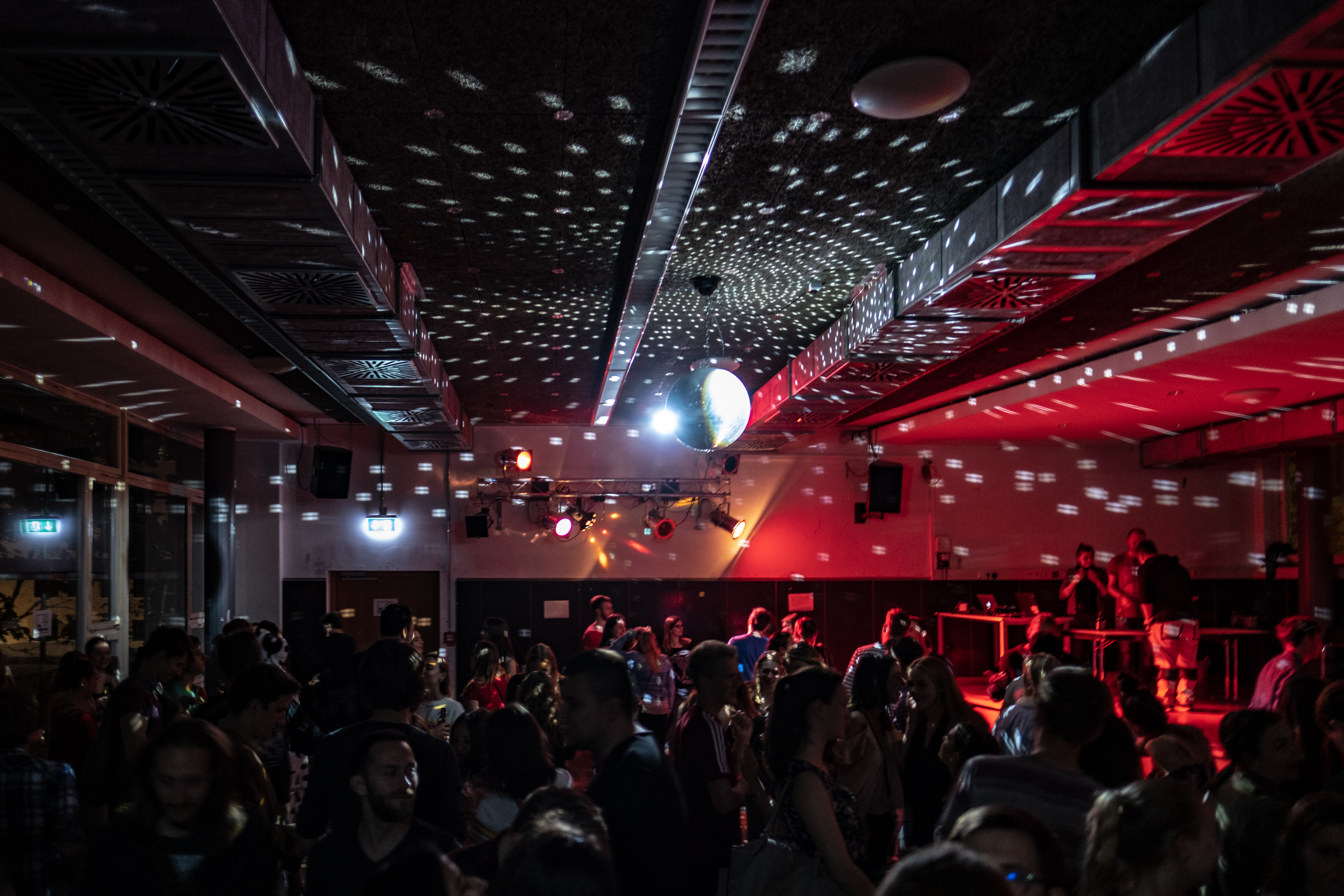 Westlicher Tanzbereich im Clubhaus Tübingen am südlichen Eingang